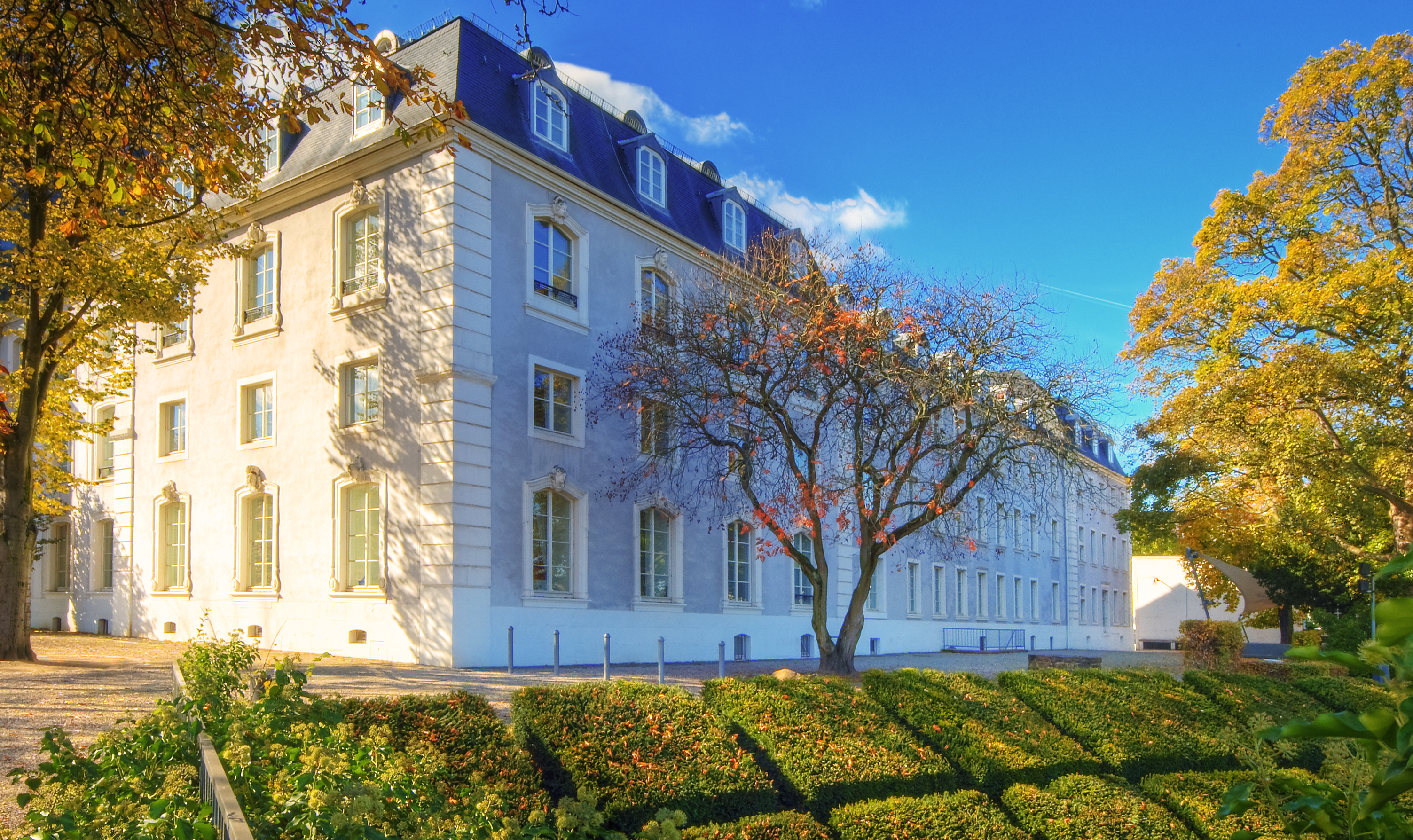 The Schloss Saarbrücken in Saarbrücken.Schloss